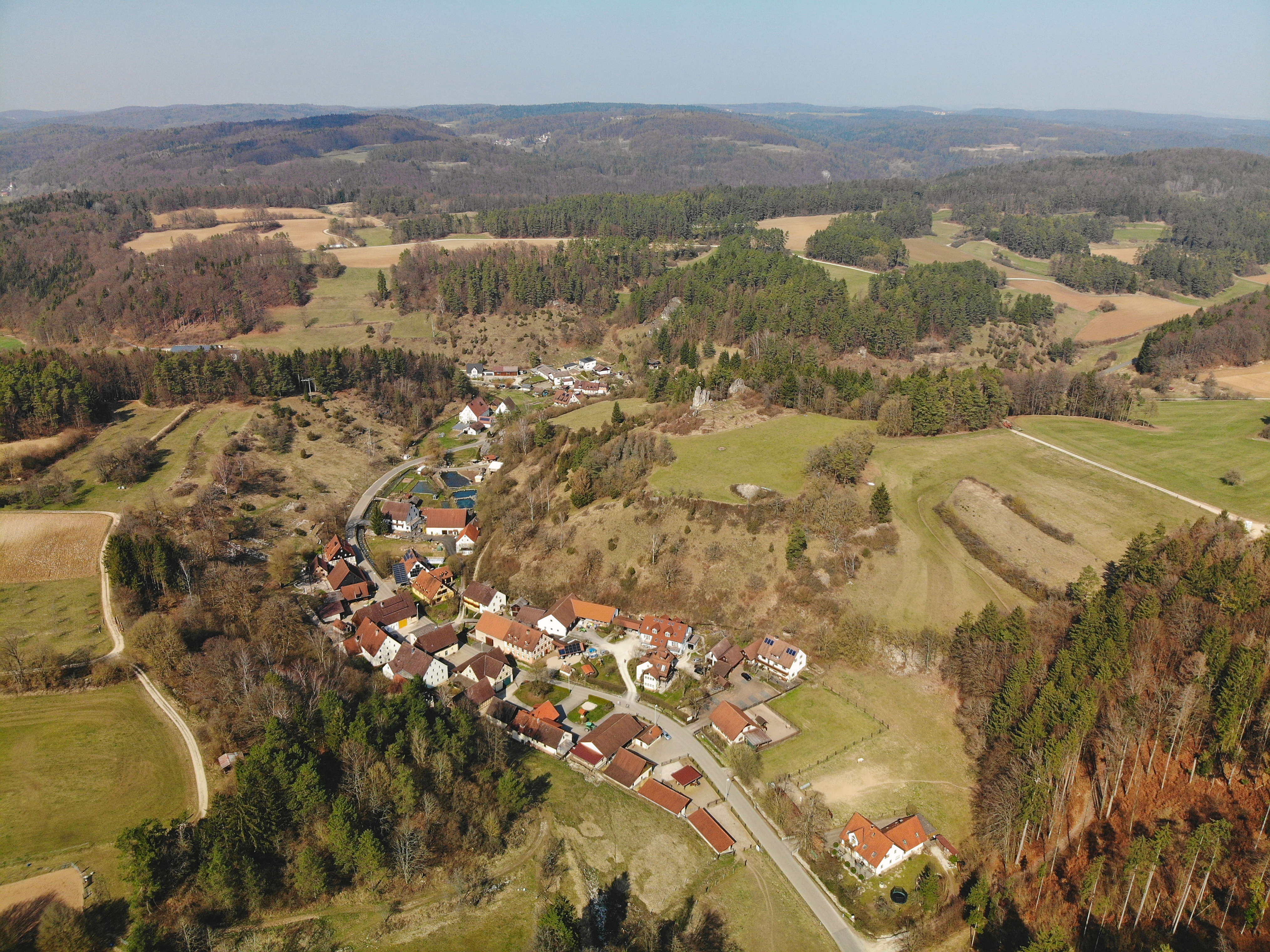 Großenohe Luftaufnahme (2020)